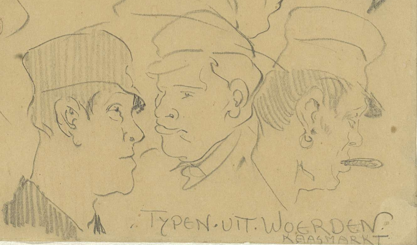 Detail of Schetsblad met kopstudies van typen op de kaasmarkt van Woerden, Leo Gestel, 1891 - 1941